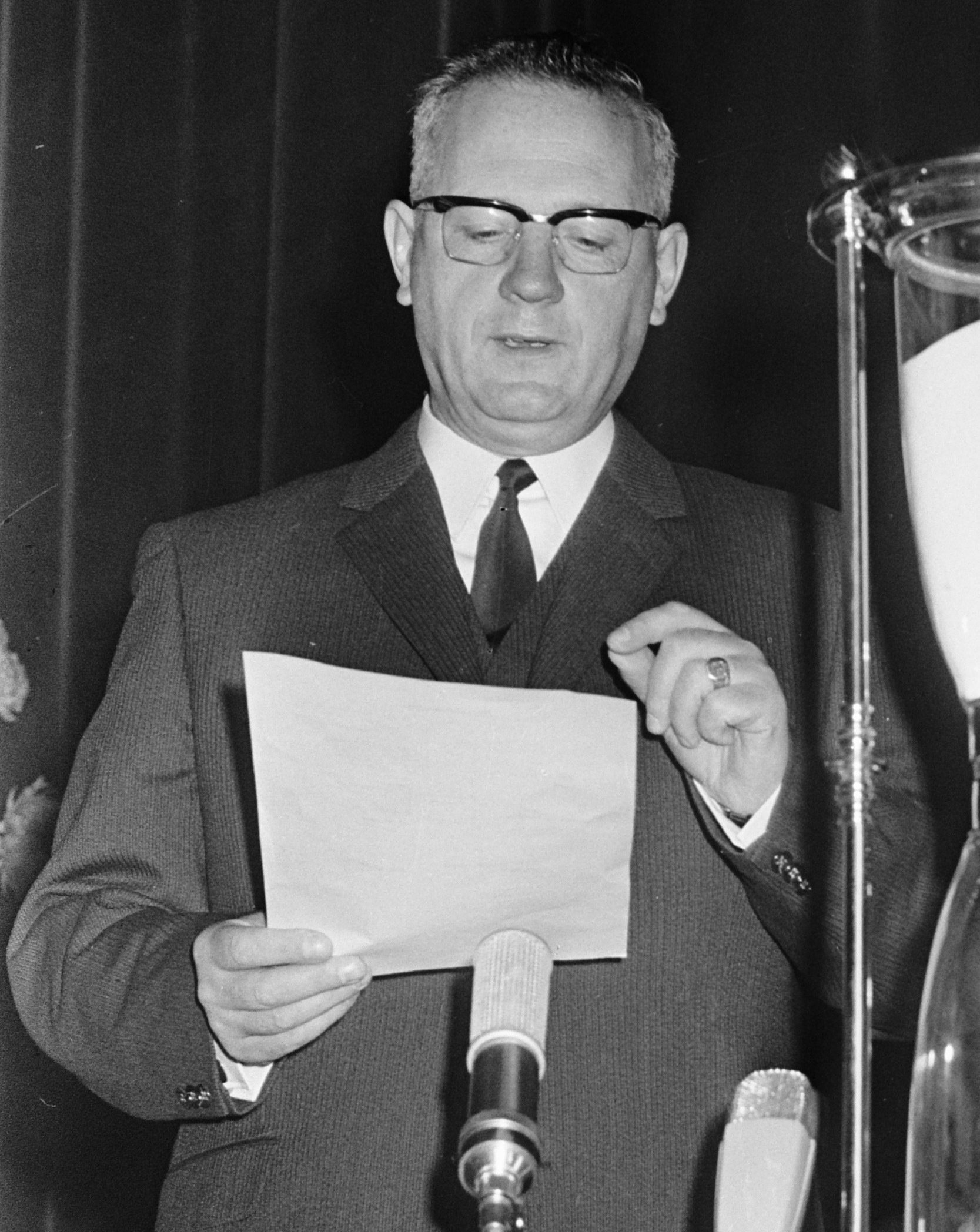 Collectie / Archief : Fotocollectie Anefo Reportage / Serie : Vergadering in de Haagse dierentuin van vermoedelijk de Arka (Algemene rooms-katholieke ambtenarenvereniging) Beschrijving : Voorzitter G.A.A.M. Boot tijdens zijn rede; naast hem een zandloper Datum : 26 oktober 1965 Locatie : Den Haag, Zuid-Holland Trefwoorden : ambtenaren, meet- en weeginstrumenten, toespraken, vakbonden, vergaderingen, voorzitters Fotograaf : Fotograaf Onbekend / Anefo Auteursrechthebbende : Nationaal Archief Materiaalsoort : Negatief (zwart/wit) Nummer archiefinventaris : bekijk toegang 2.24.01.05 Bestanddeelnummer : 918-3617